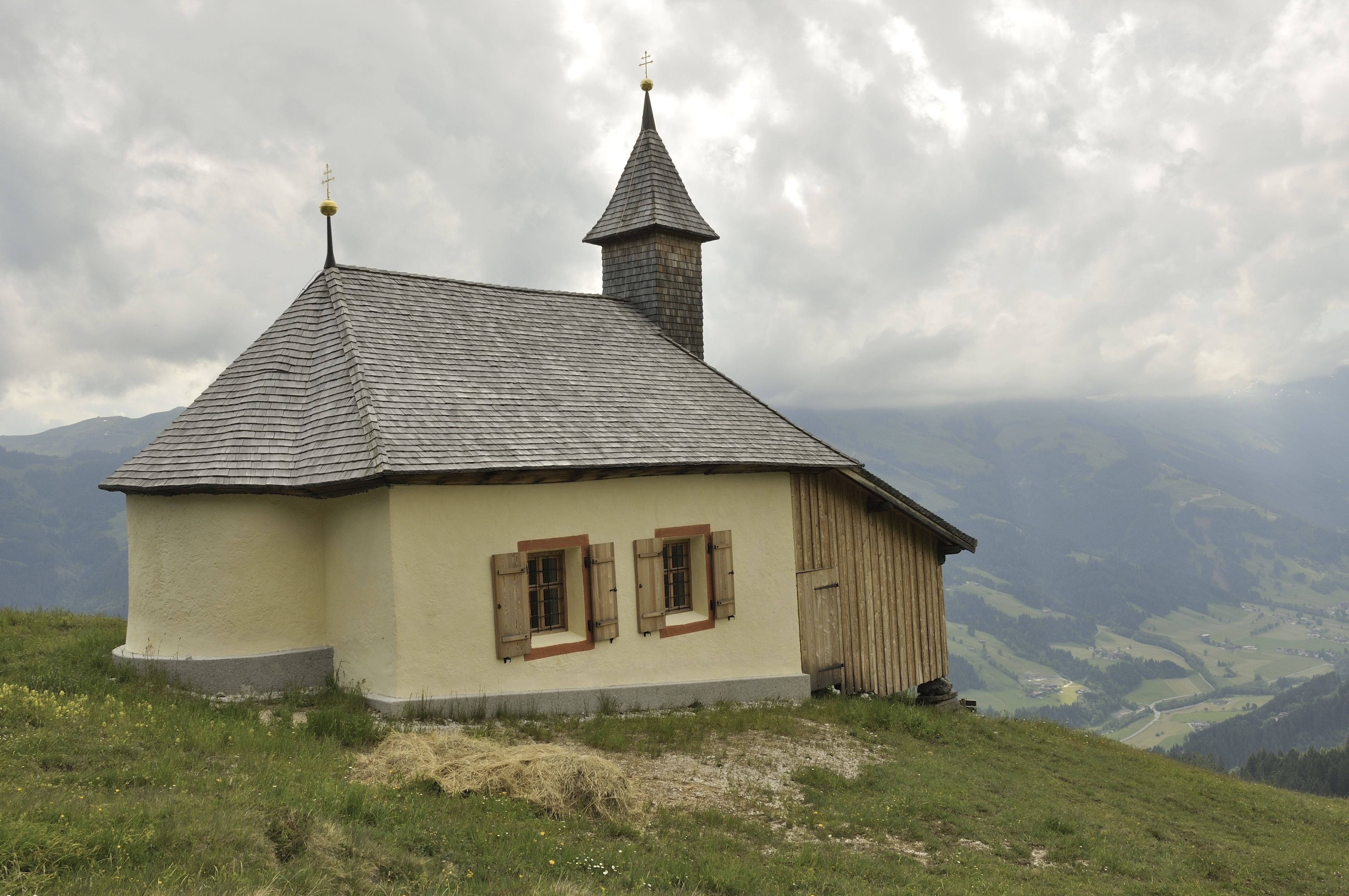 Kapelle hl. Mariä Heimsuchung, Kapelle Harlaßanger